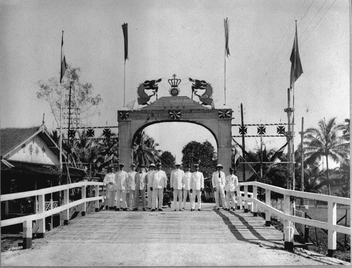 Foto. Ter herinnering aan het bezoek van Zijne Excellentie den Gouverneur-Generaal van Nederlandsch-Indië Mr. D. Fock aan de residentie Zuider- en Oosterafdeeling van Borneo (April 1924). Opgerichte erepoort in de Chinese wijk te Bandjermasin ter gelegenheid van de komst van de Gouverneur-Generaal van Nederlands-Oostindië aan de Zuider- en Oosterafdeling van Borneo